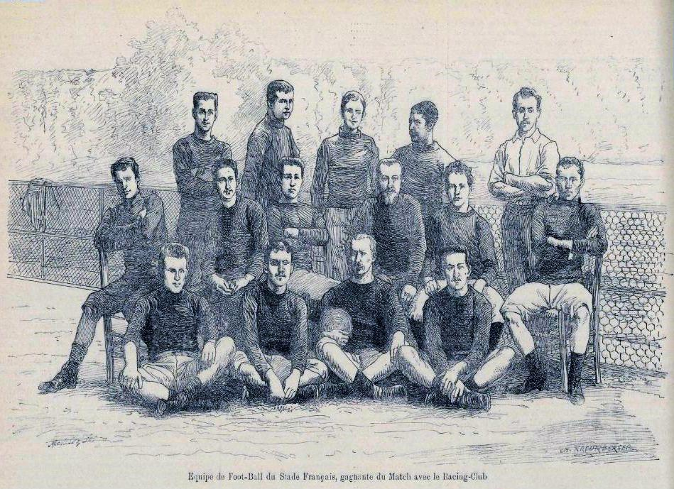 L'équipe de foot-ball du Stade français, victorieuse de son match contre RCF en juin 1891.